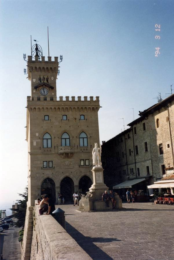 Deitsch: Historische Parlamentgebaude